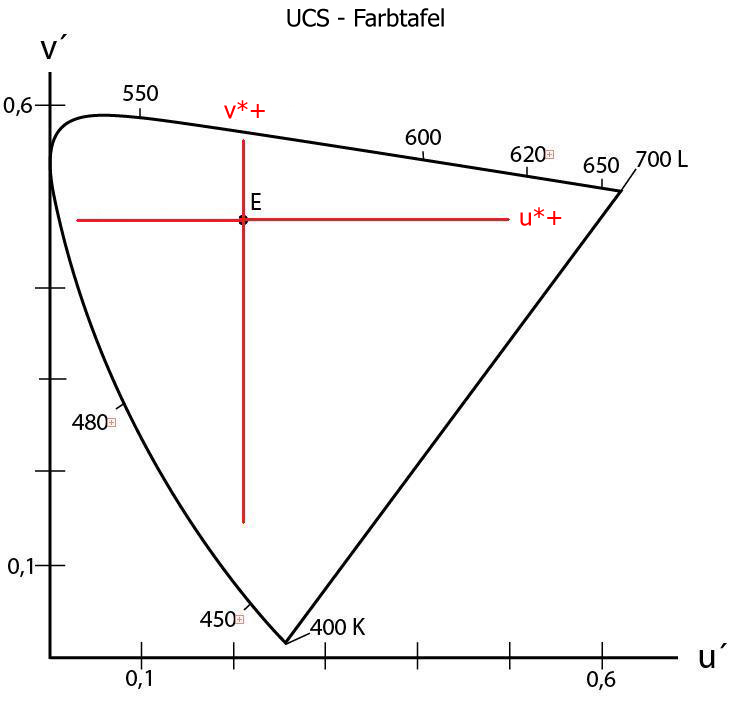 u*v* Farbebene des Luv-Farraums